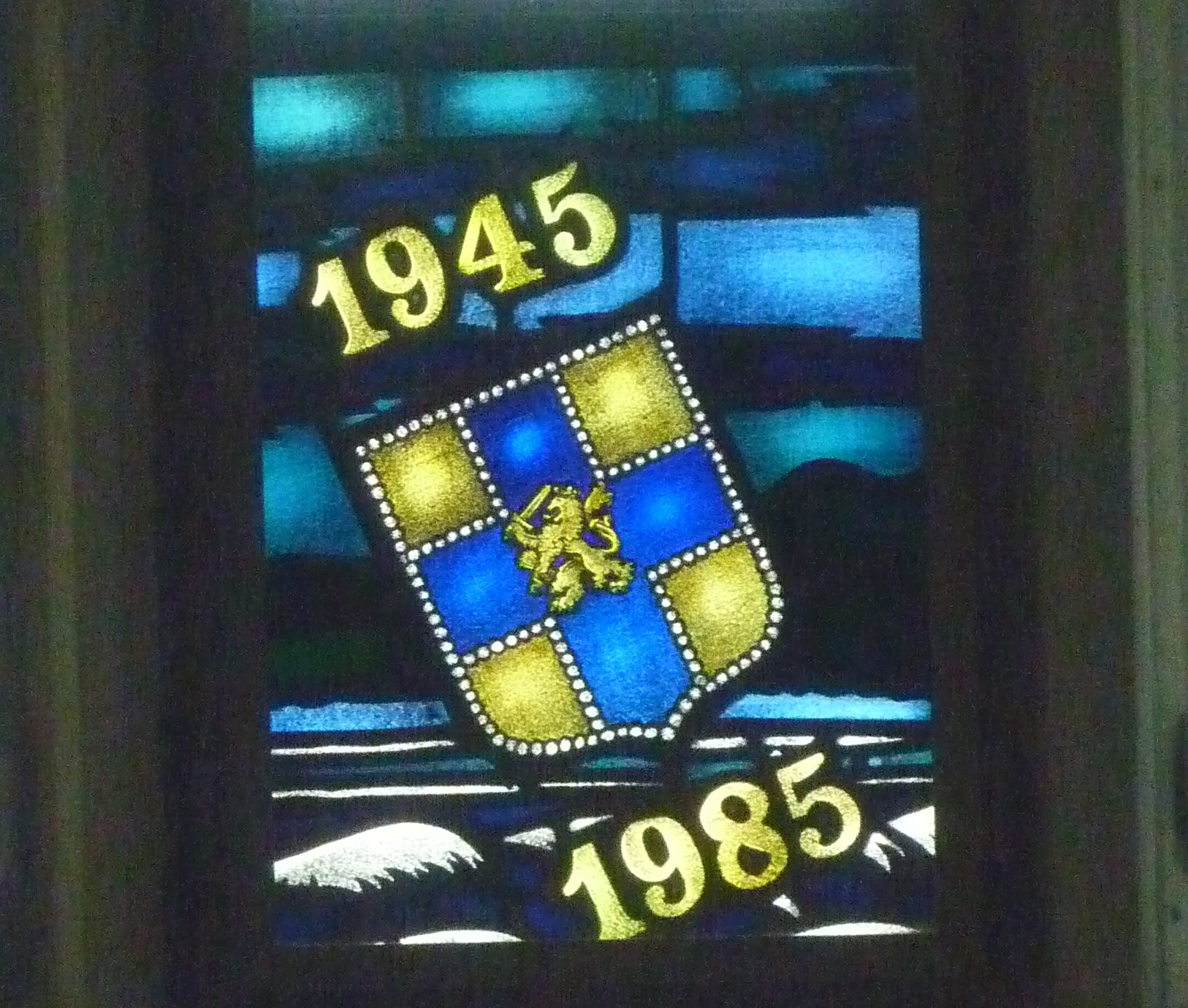 Glas-in-lood raam in de hal van De Zwaluwenberg